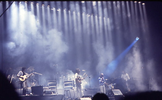 MLG, Toronto, June 3,1977